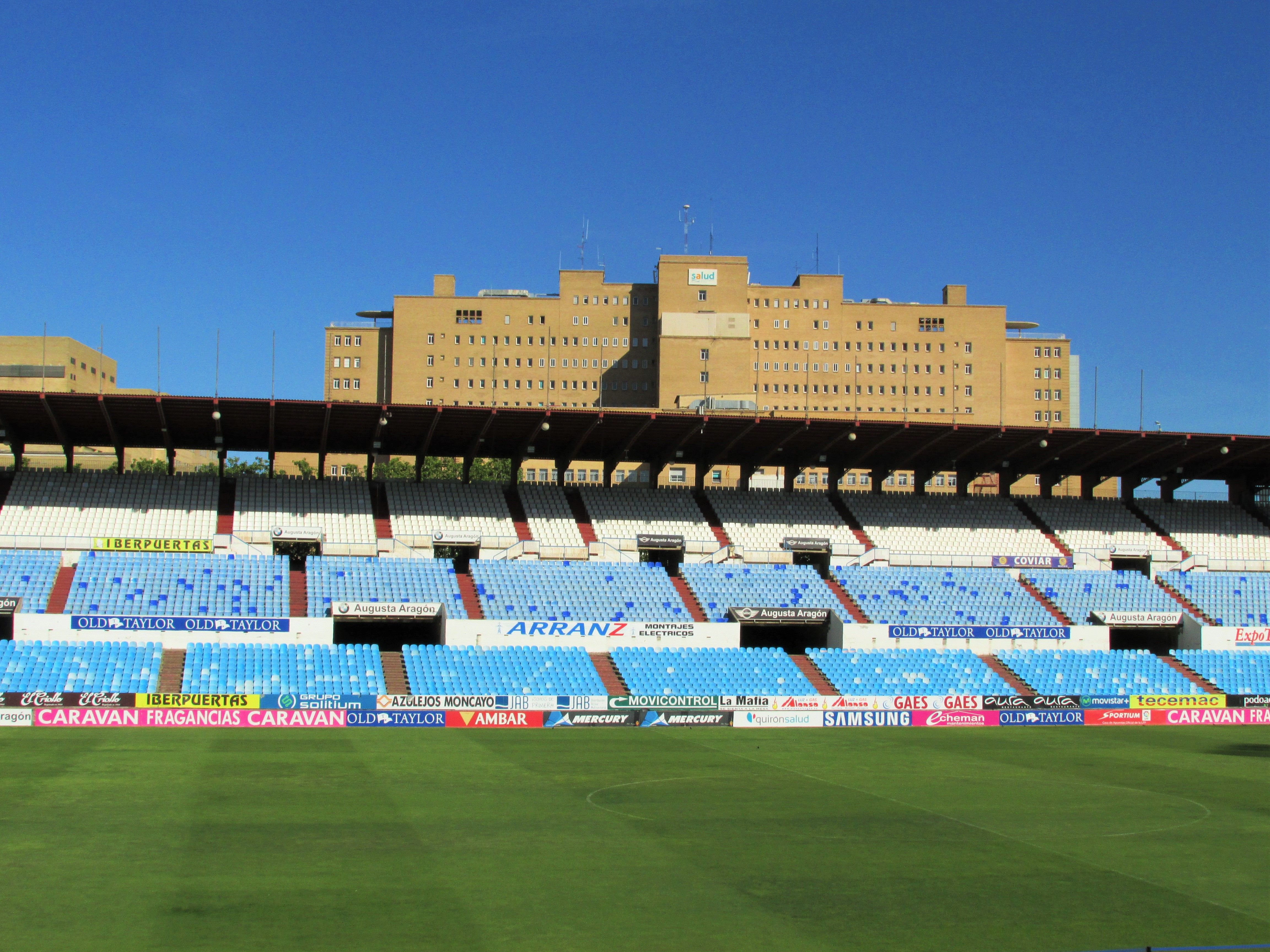 Gradas tribuna este La Romareda